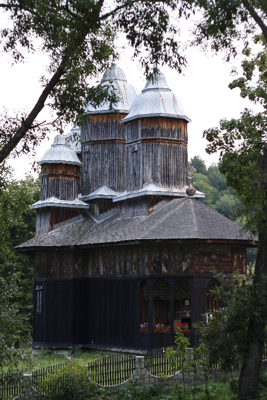 Biserica “Duminica Tuturor Sfinţilor” de la Schitul Poiana Mărului, comuna Bisoca, judetul Buzău, monument istoric Cod LMI BZ-II-m-A-20156.02, a fost construită între 1810-1812. Cu dimensiuni impresionante, este singura biserică de lemn din Muntenia, pictată la interior şi la exterior, şi una din cele mai elaborate construcţii religioase din Vrancea.